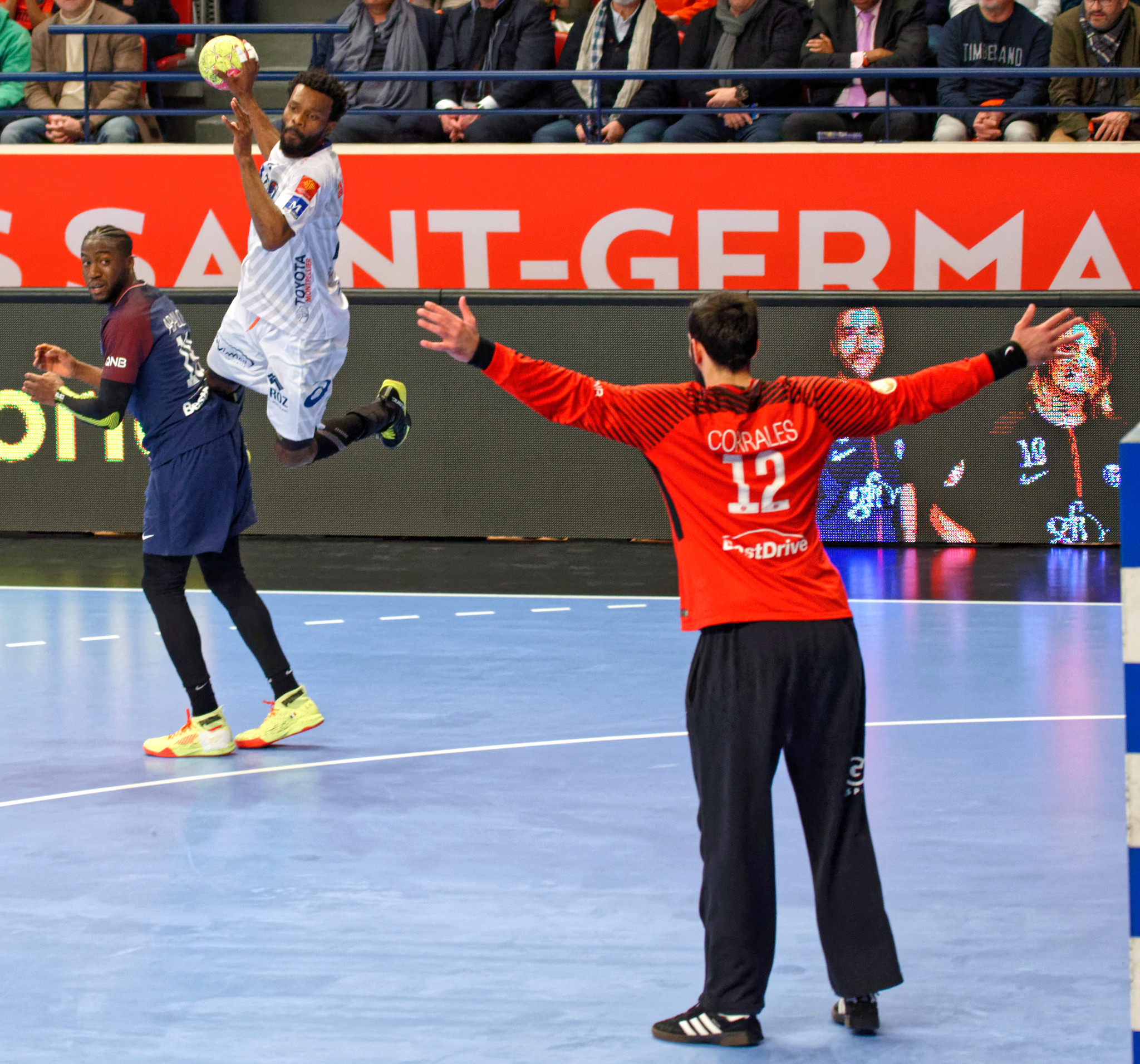 Rencontre de championnat entre le PSG et Montpellier. A Coubertin, le 1er mars 2018.